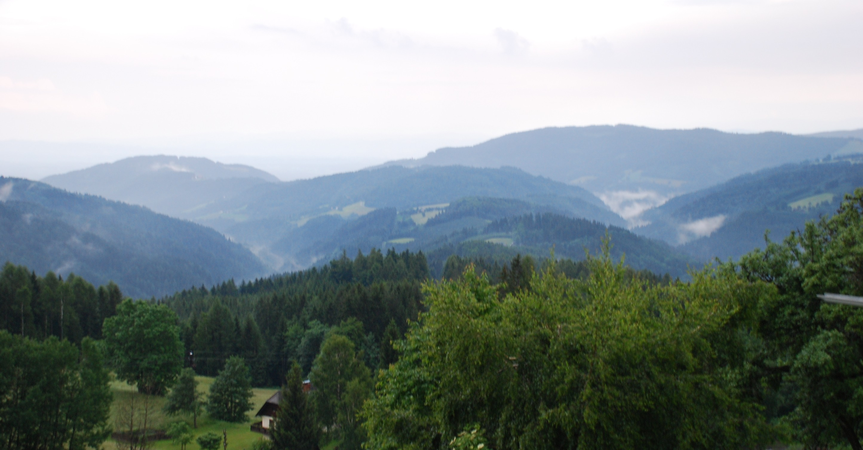 Höhenzug des Schwarzkogels zwischen den Tälern von Wildbach (links) und (Niederer) Laßnitz. Im Mittelgrund Freiland, dahinter links der Laufenegger Kogel, rechts Trahütter Kogel. Am Horizont Grazer Becken im Bereich der Gleinz und Deutschlandsbergs.